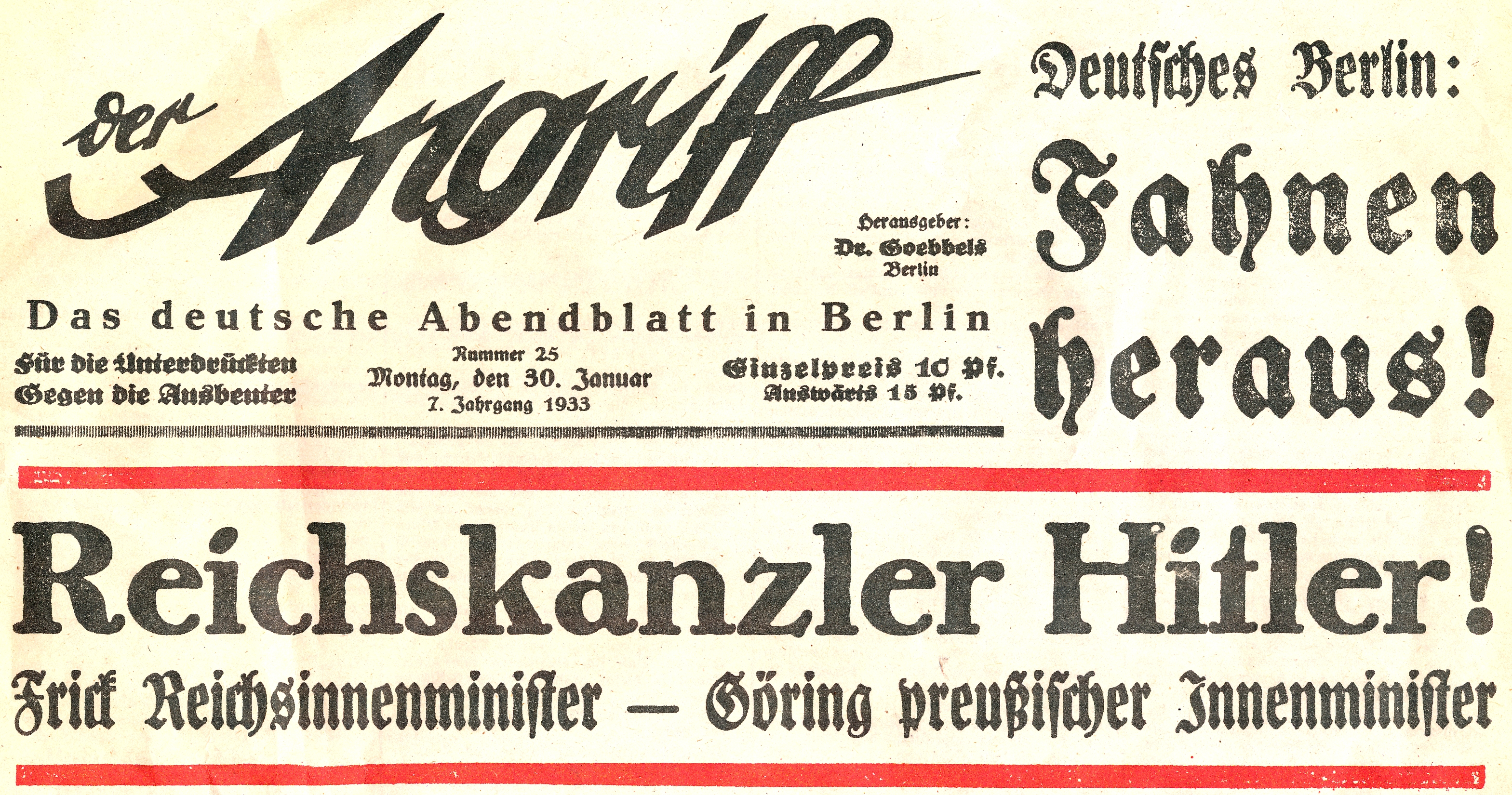 Pressemitteilung des Berliner Abendblatts "Der Angriff" vom 30. Januar 1933 zur Machtergreifung Adolf Hitlers (eigener Scan des Autors Mabit1)